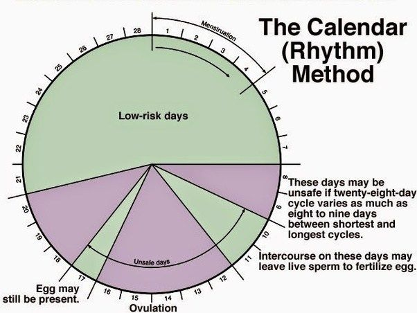 דיאגרמה המתארת את מידת הסיכון להפריה בימים מסוימים בחודש.